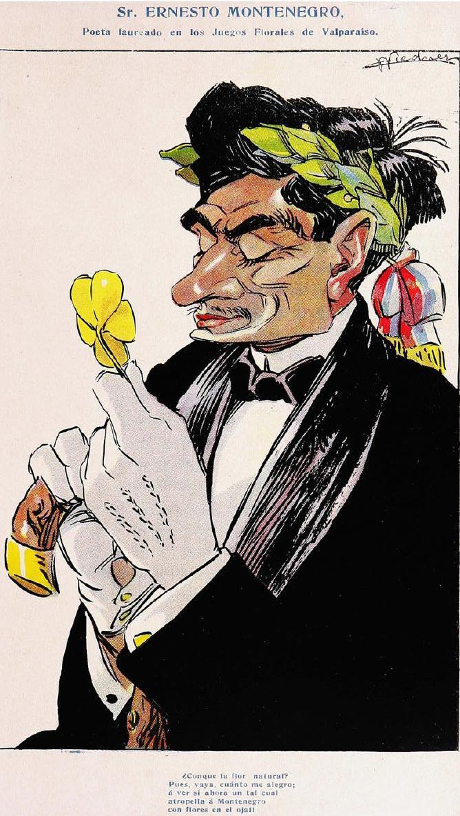 Caricatura de Ernesto Montenegro en 1910 al ganar los Juegos Florales del Bicentenario. Ernesto Montenegro (Almendral, San Felipe, 1885 - 17 de junio de 19671 ) fue un escritor y periodista chileno perteneciente a la generación de 1912.